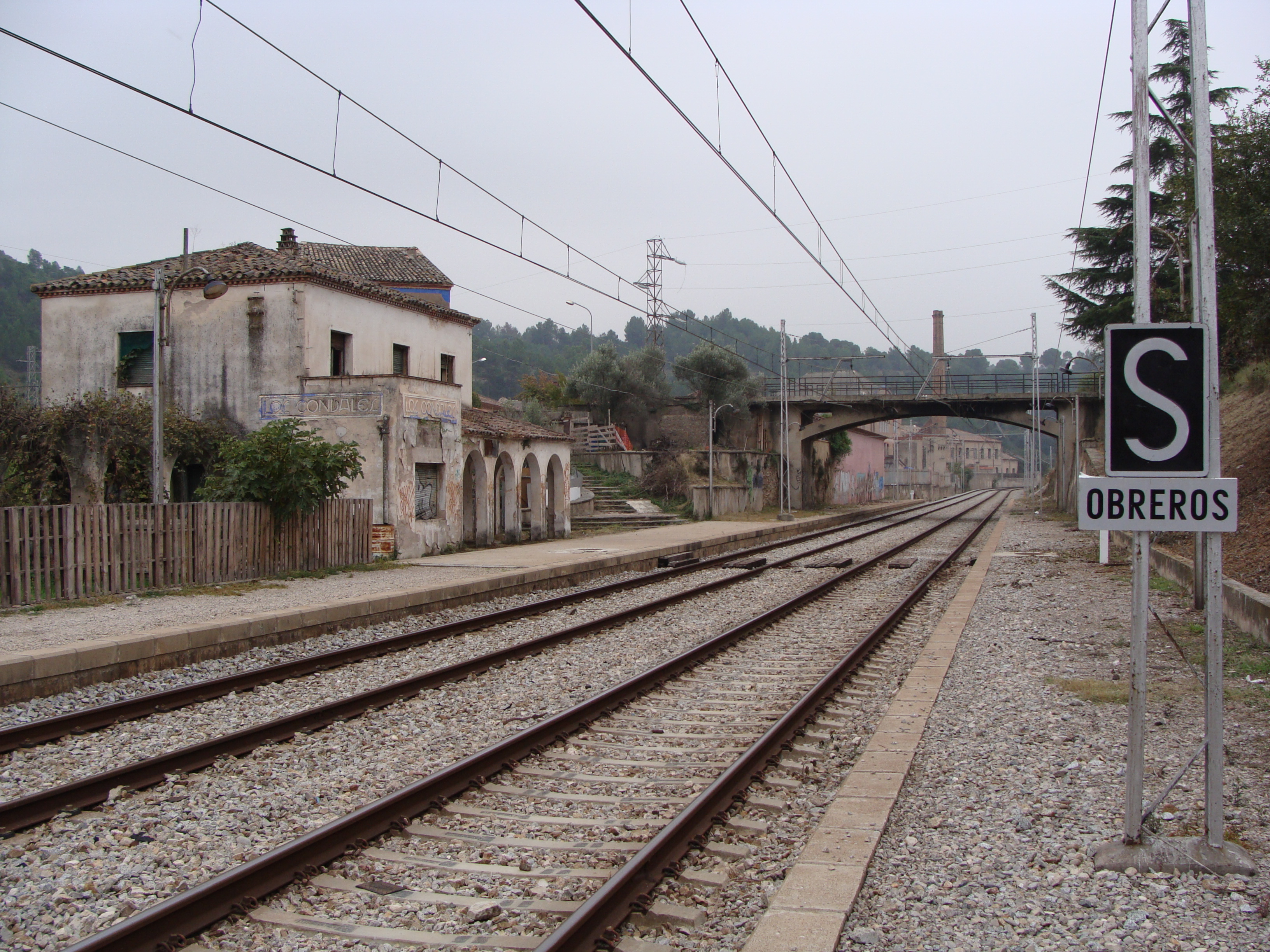 Vista general de l'antiga estació de Els Condals/Els Comtals, el pont dona accés a la fàbrica de "Els Comtals" que es pot veure al fons de la imatge.